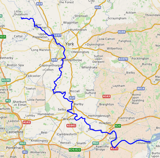 carte réalisée sur umap This map may be incomplete, and may contain errors. Don't rely solely on it for navigation.